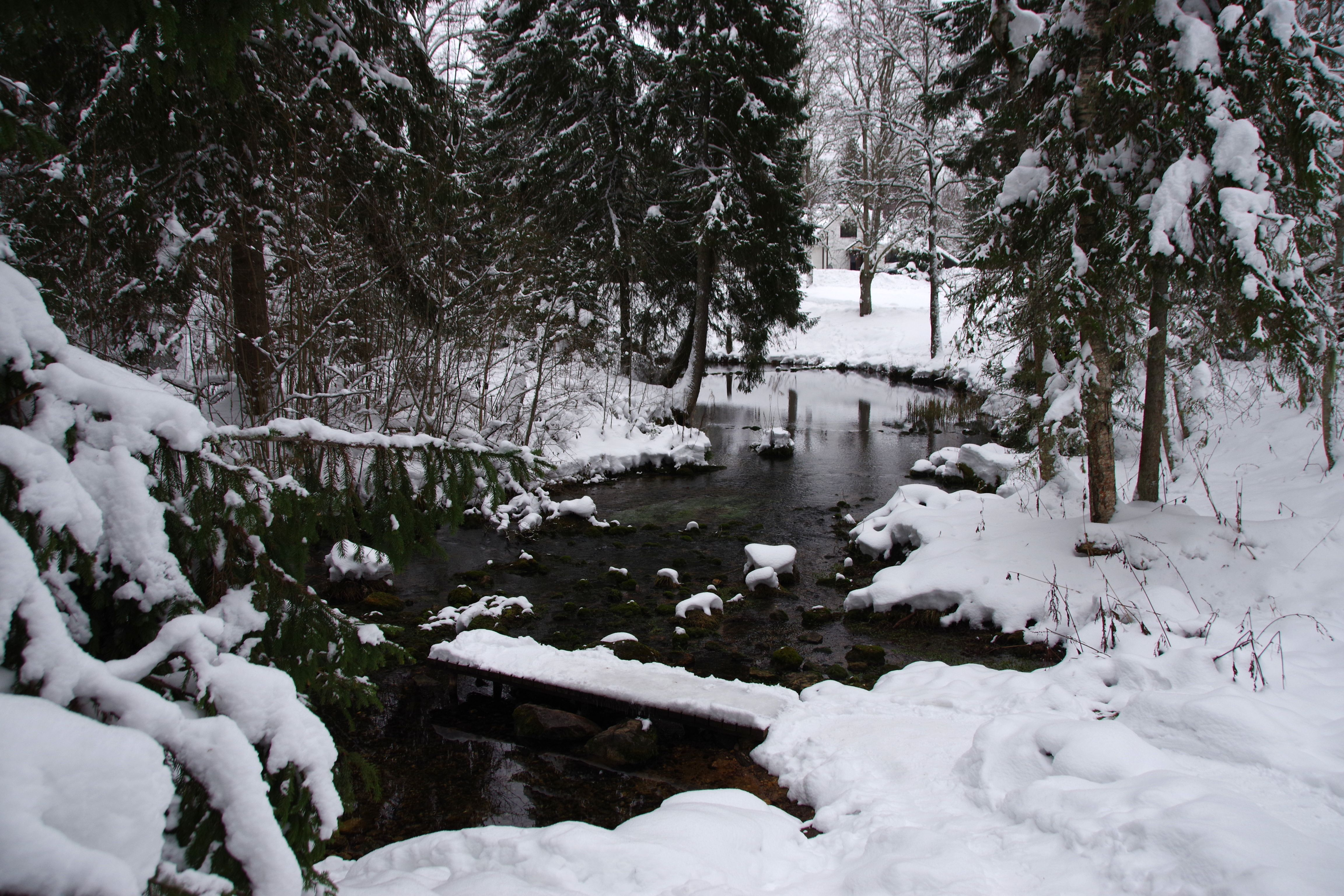 Lavi allikas on ohvriallikas Lääne-Viru maakonnas Vinni vallas Pandivere kõrgustiku idaosas.